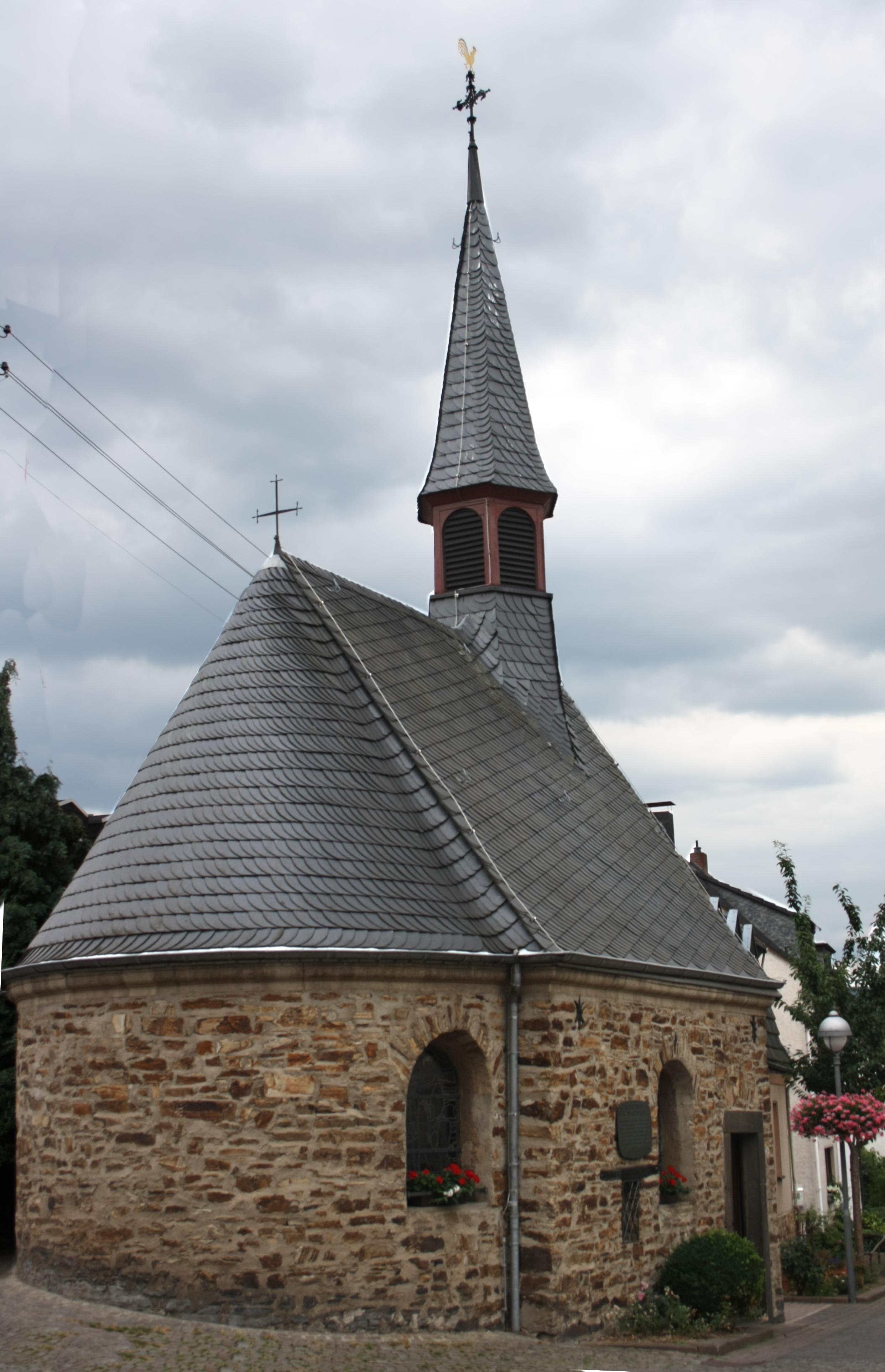 St. Leonardus-Kapelle in Bachem, einem Ortsteil von Bad Neuenahr-Ahrweiler, Außenansicht